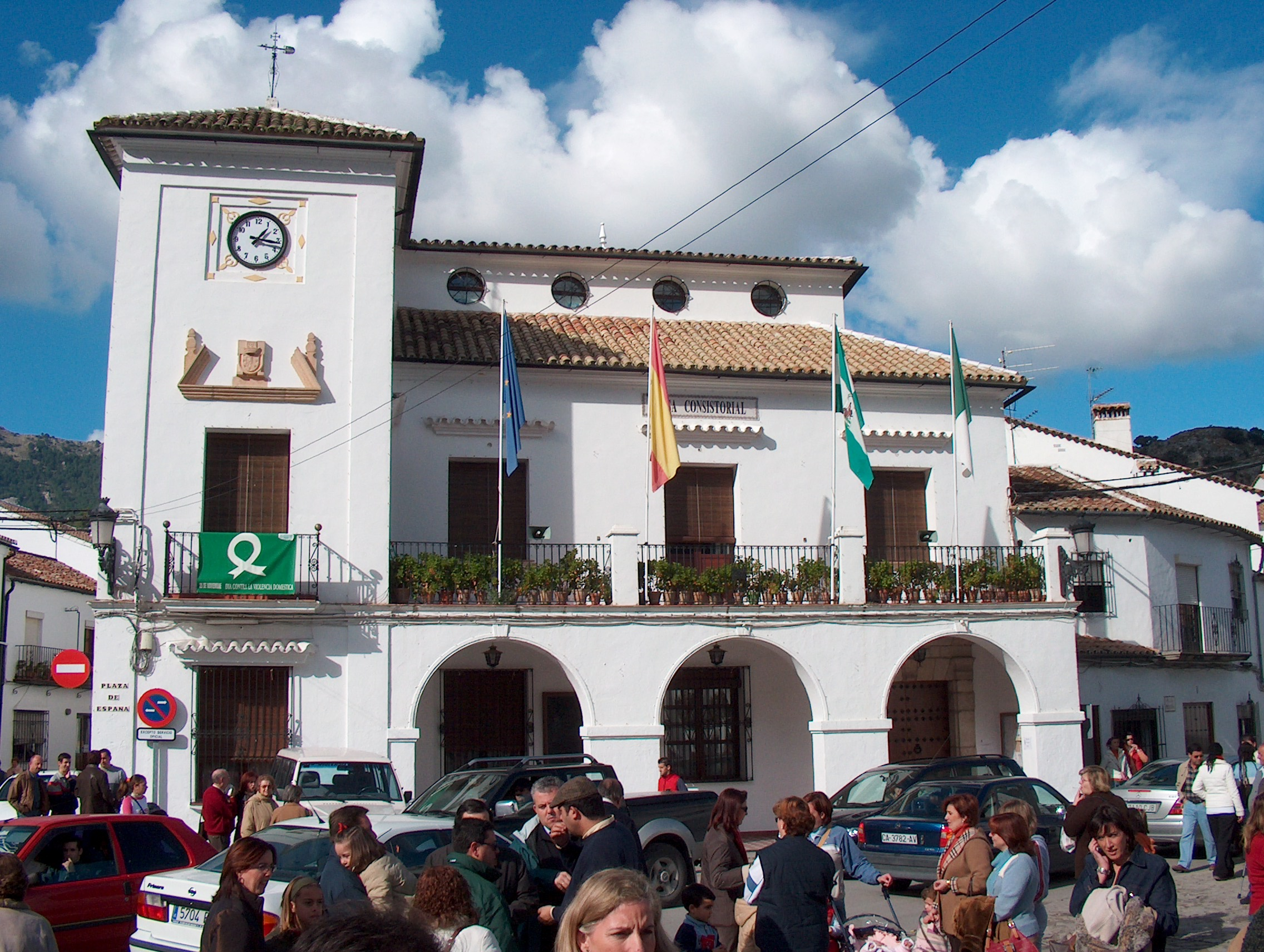 Casa Consistorial. Grazalema (Cádiz) Tomada por Alexwing 6 de Diciembre 2004 Categoría:España (imagen)